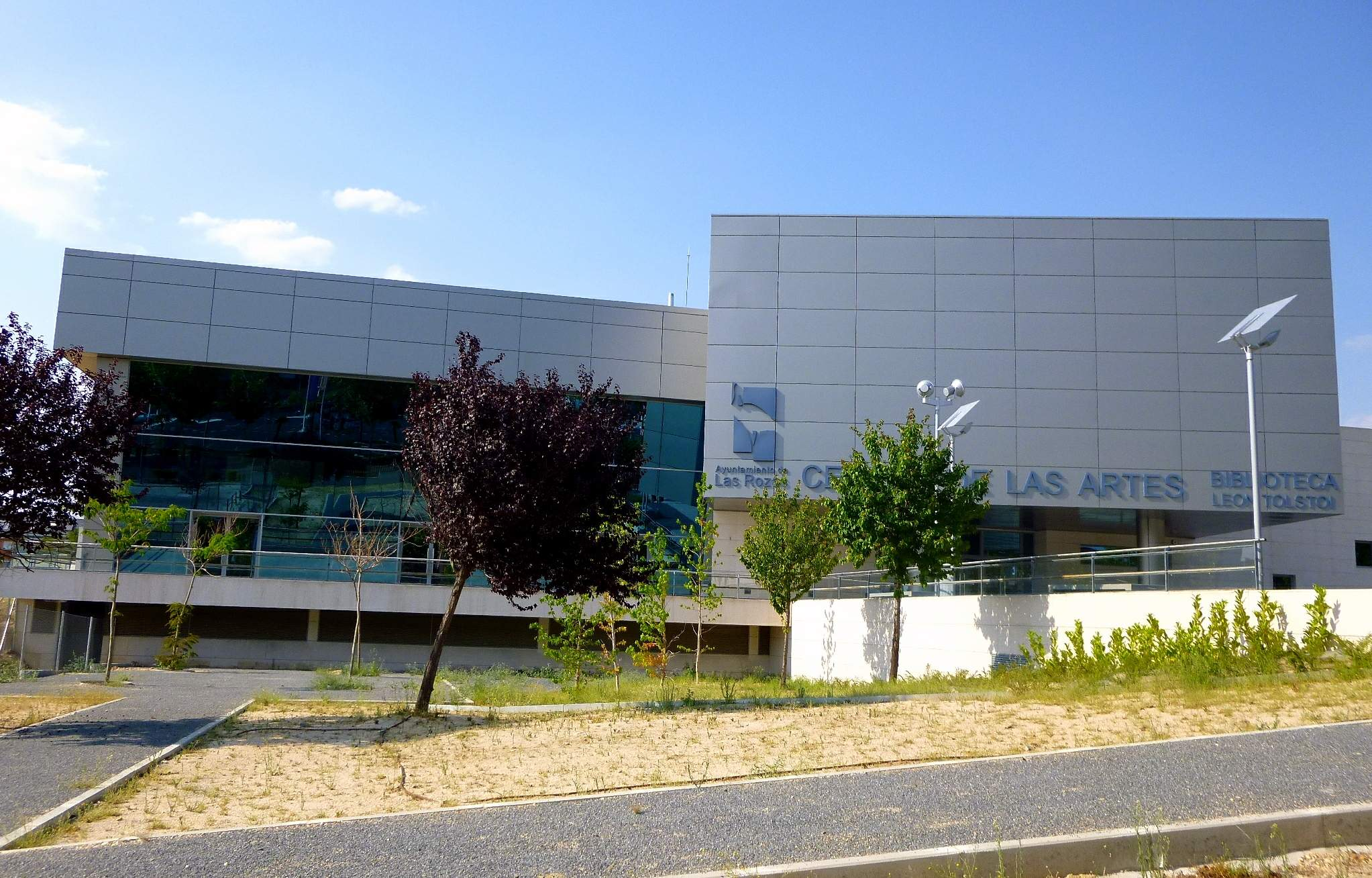 Centro de las Artes y Biblioteca Leon Tolstoi (Las Rozas, Madrid)